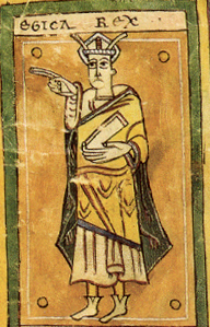 Reyes visigodos: Égica. Según Códice Albeldense o Vigilano detalle del folio 428 del mismo.